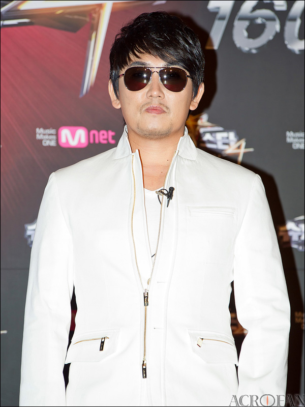 이승철. CJ E&M 엠넷 슈퍼스타K 시즌4 제작발표회에서